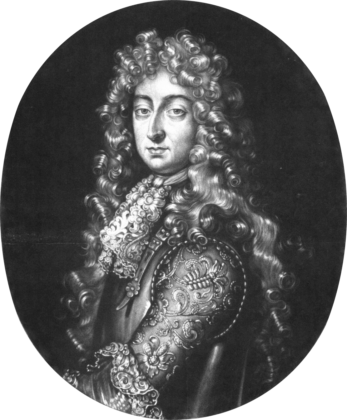 Charles de Lorraine